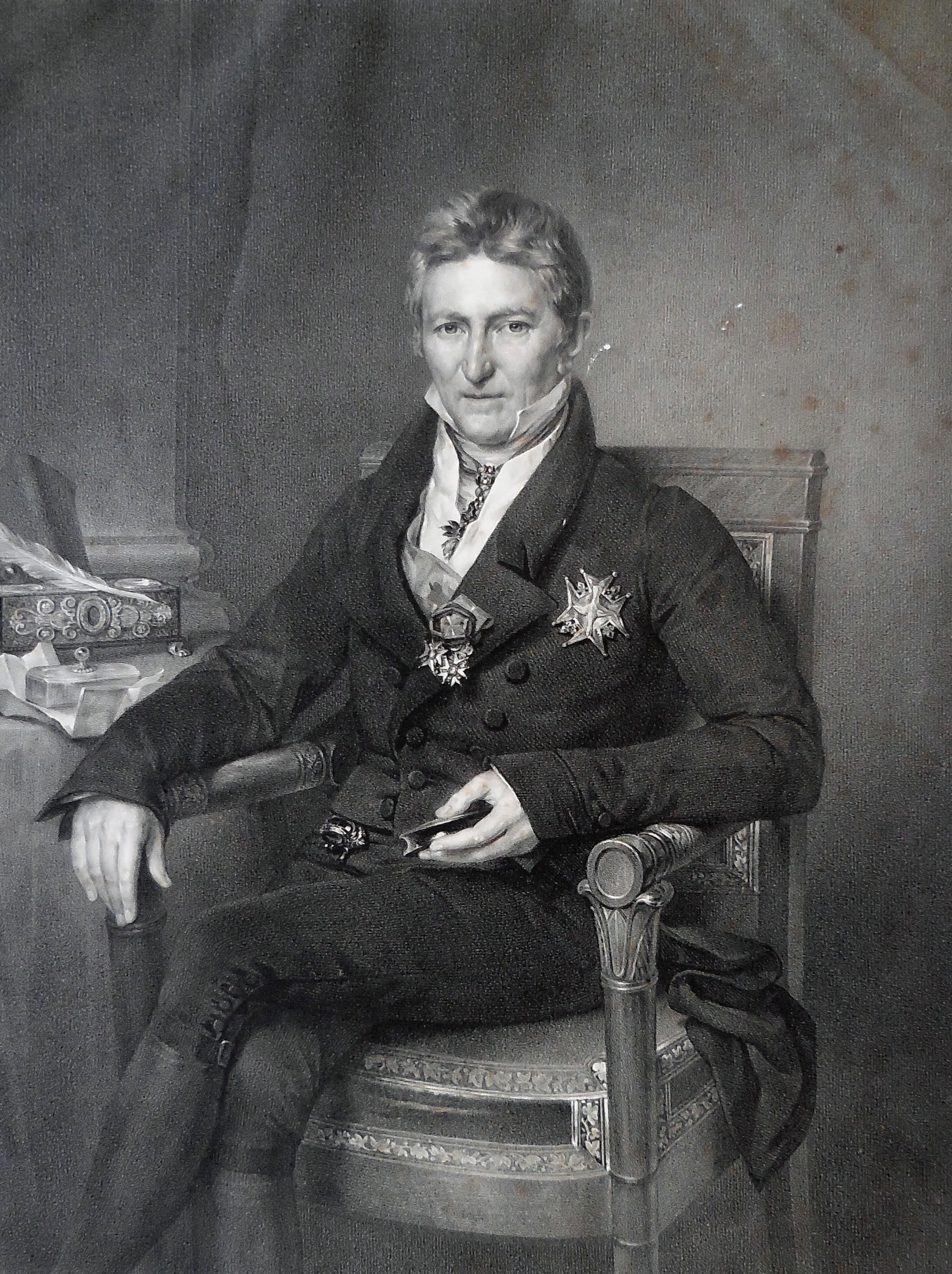 Le Comte Joseph de Villèle, maire de Toulouse de 1815 à 1818.